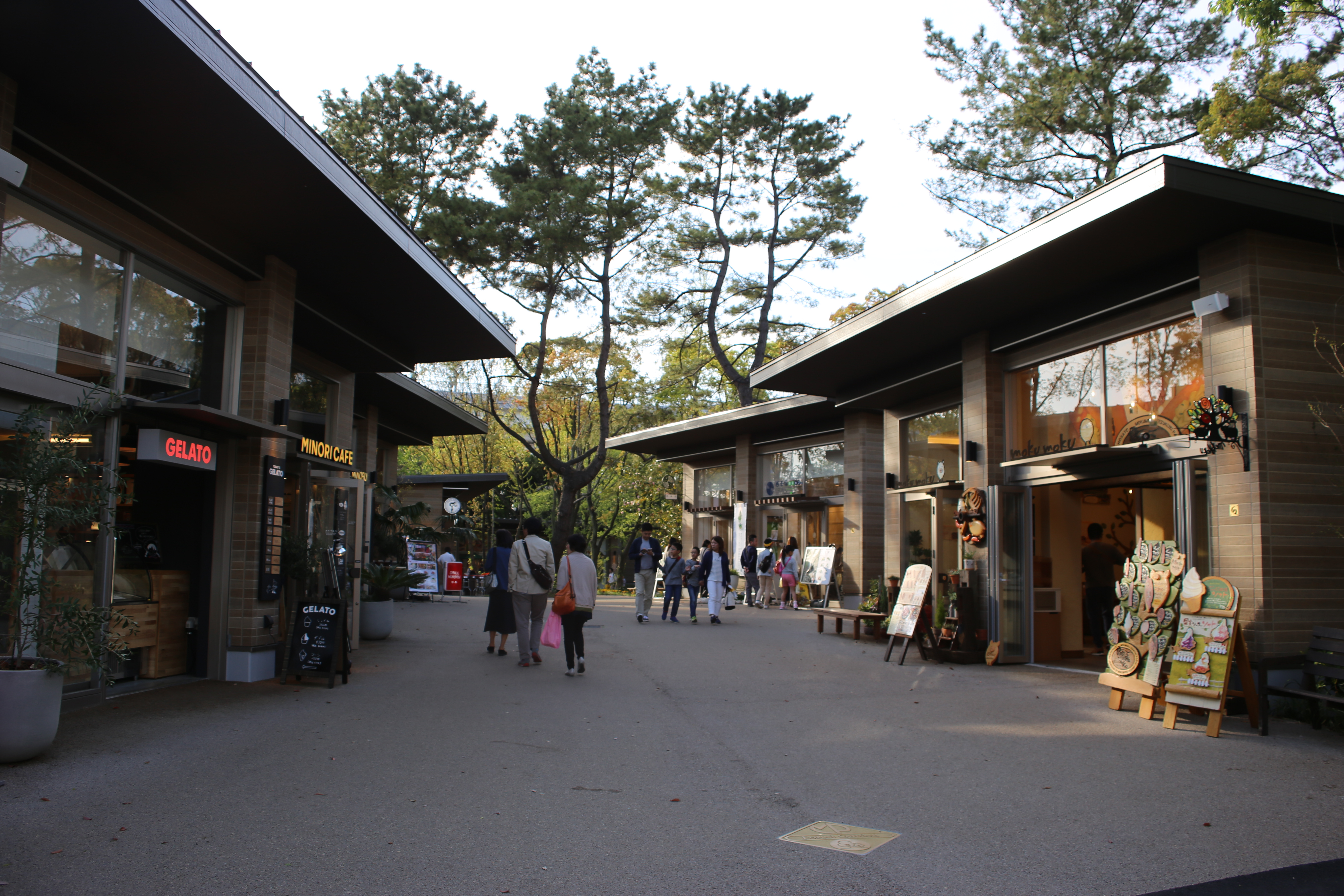 名古屋市港区金城ふ頭のメイカーズピア